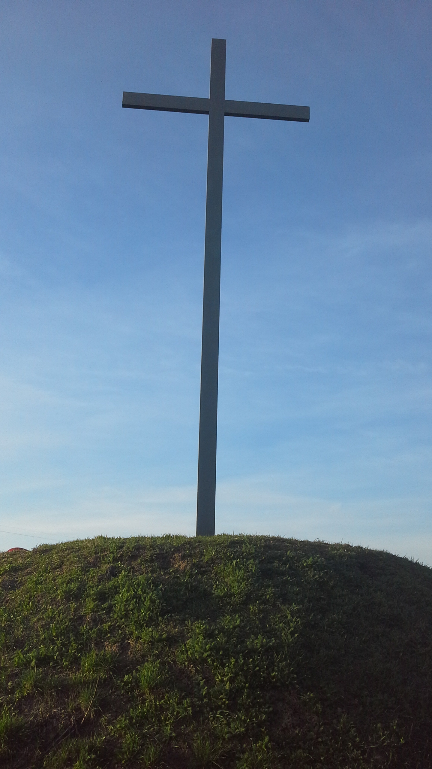 Kopiec i krzyż upamiętniający bitwę pod Komarowem na terenie wsi Wolica Śniatycka